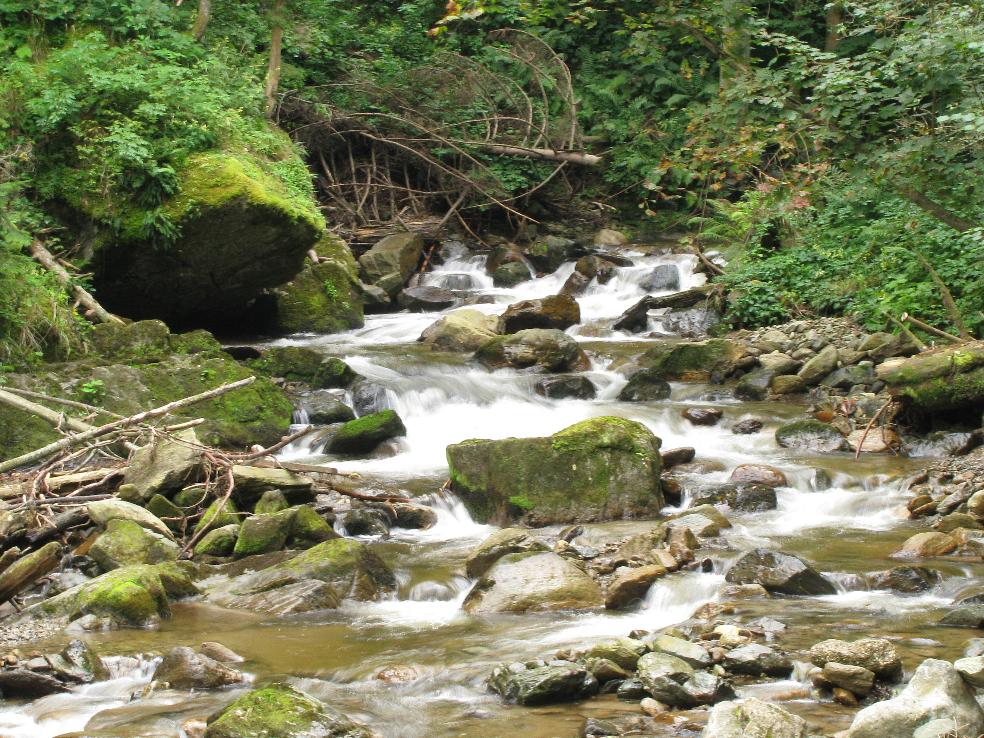 potok Lobnica, Pohorje